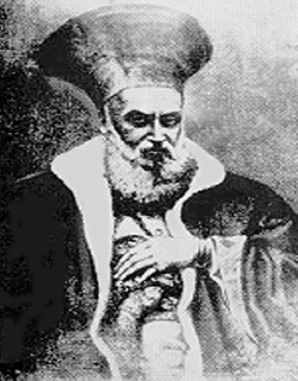 Portrait of Ilie Kogălniceanu, Mihail Kogălniceanu's father